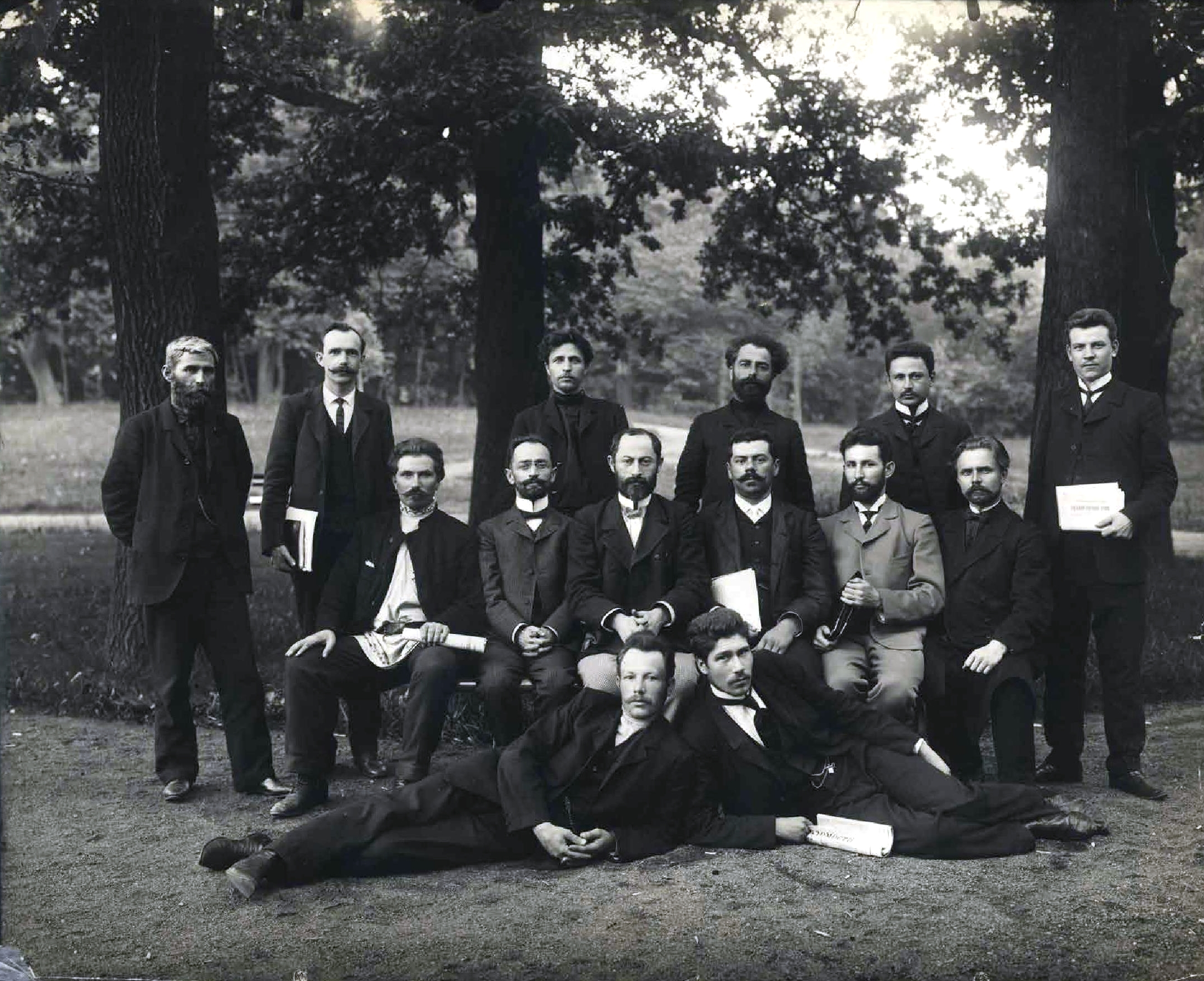 Социал-демократическая фракция I Государственной думы. Стоят: Рамишвили, Исидор Иванович Савельев, Иван Феоктистович Выровой, Захарий Иванович Церетели, Симон Николаевич Гомартели, Иван Гедеванович Смирнов, Александр Иванович Сидят: Михайличенко, Митрофан Иванович Джапаридзе, Сергей Давидович Жордания, Ной Николаевич Ильин, Владимир Алексеевич Ершов, Пётр Андреевич Шувалов, Иван Евсеевич Лежат: Чурюков, Василий Николаевич Антонов, Иван Иванович